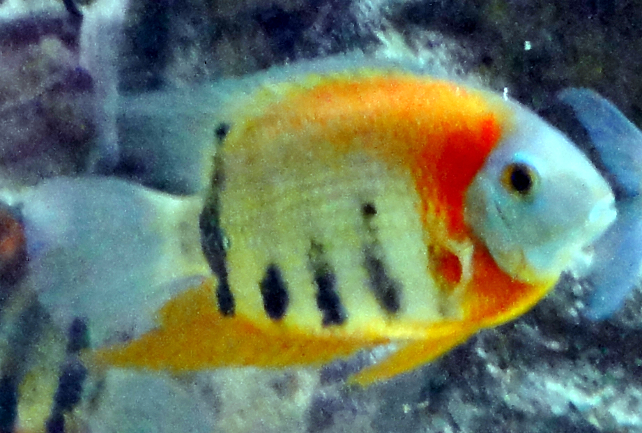 Heros efasciatus